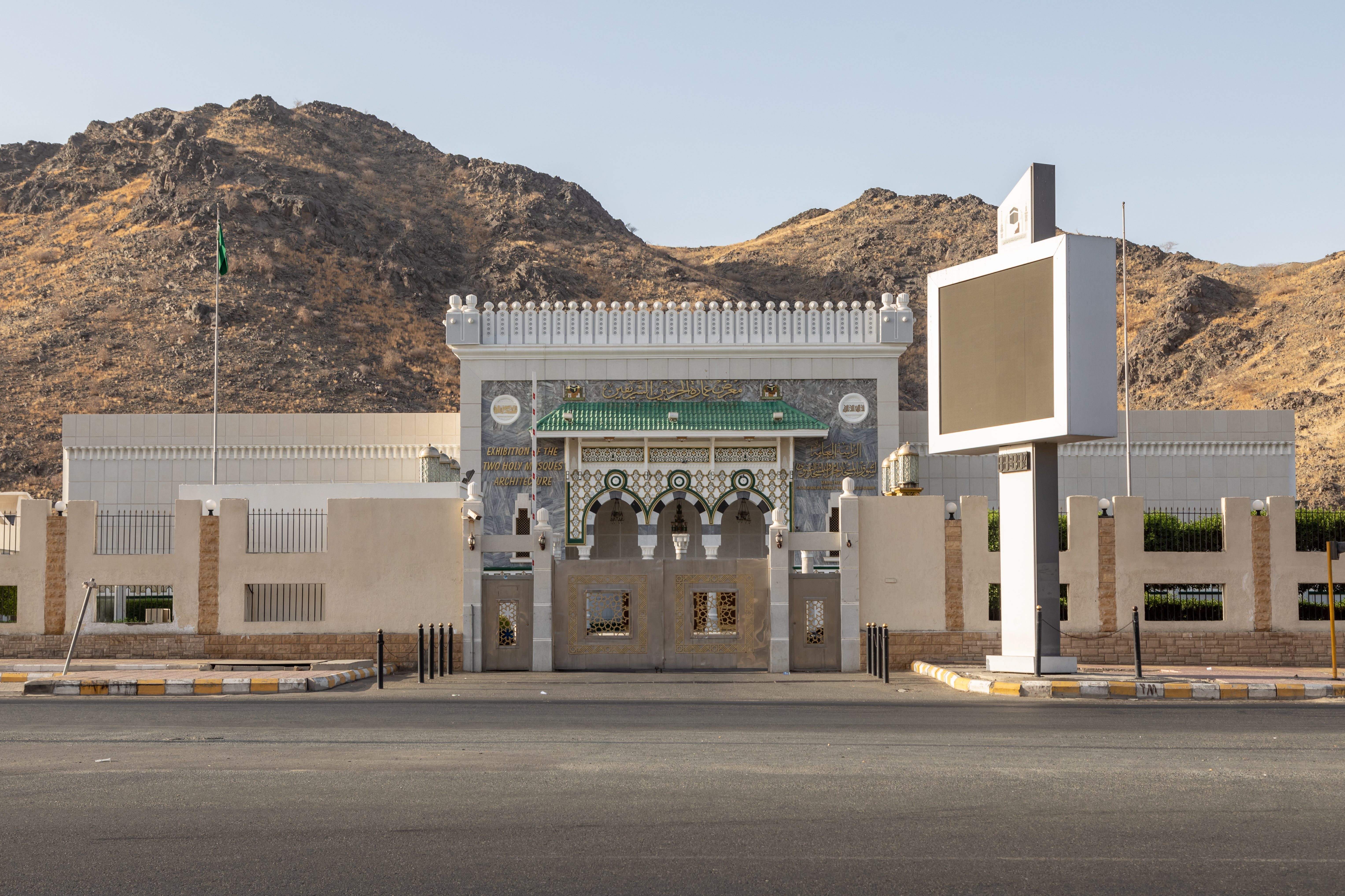 متحف الحرمين الشريفين